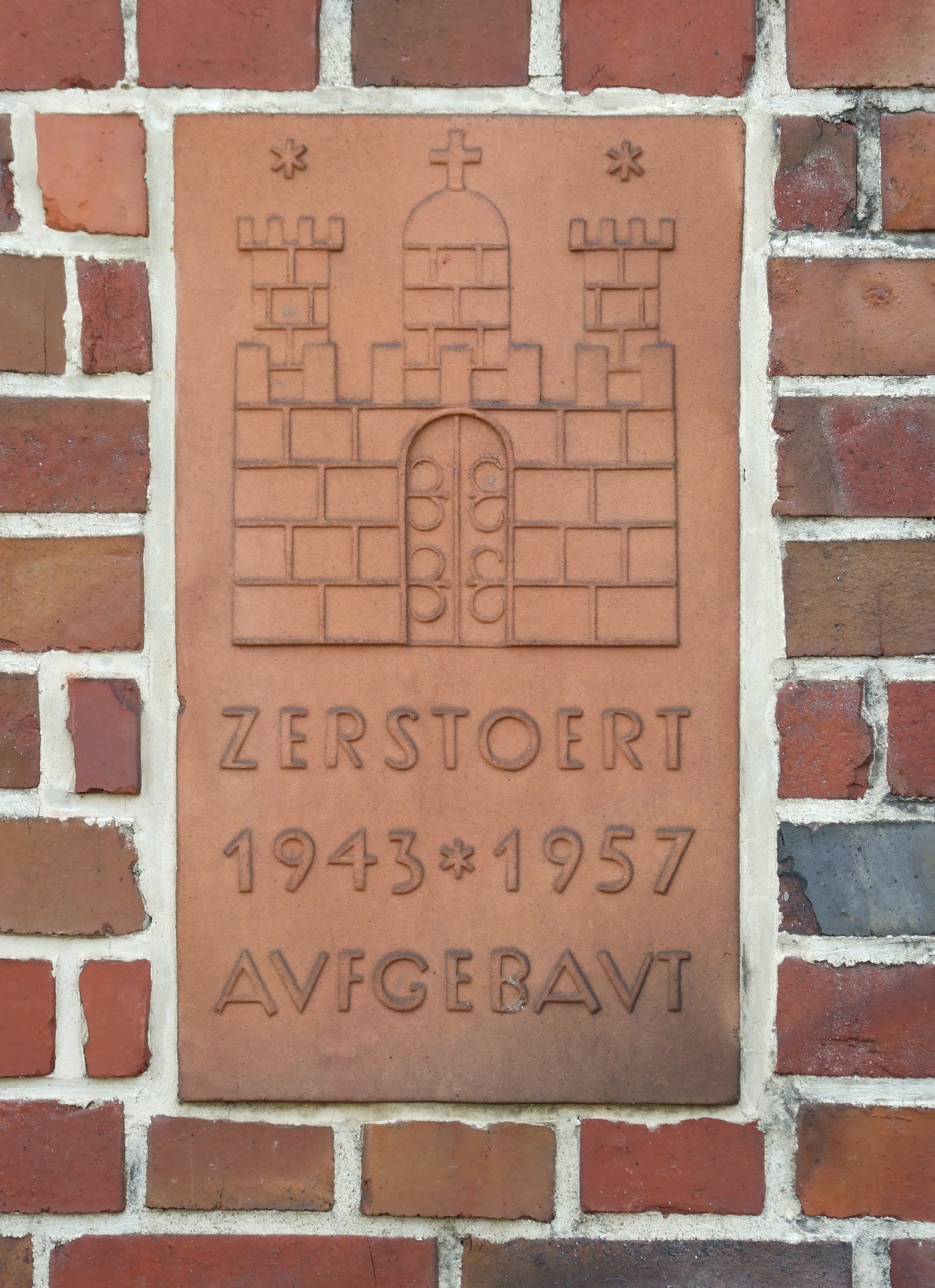 Gedenktafel an einem während der Operation Gomorrha zerstörten und in der Nachkriegszeit wiederaufgebauten Haus in Hamburg